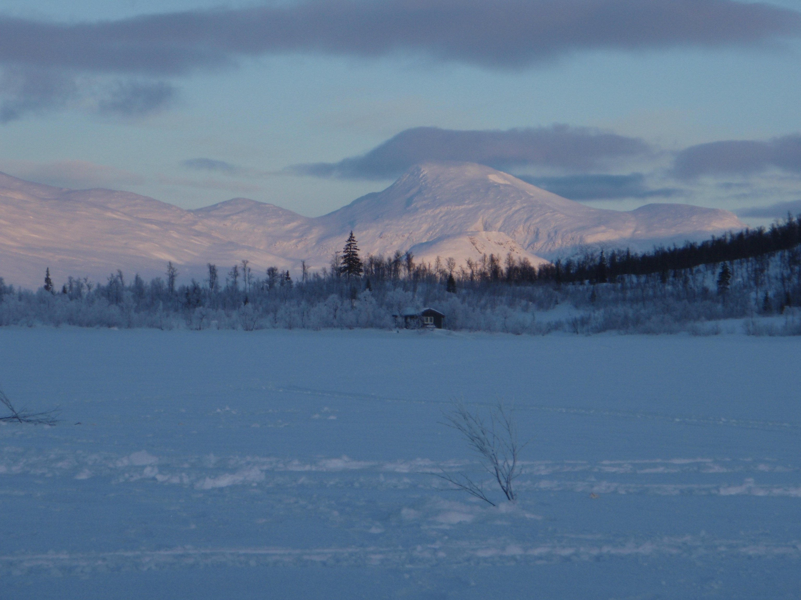 Geittinden sett fra Fisklausvatnet, med Grane jeger og fiskerforenings hytte. Toppen ligger på grensen mellom kommunene Hattfjelldal, Hemnes og Vefsn i Nordland.